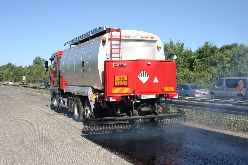 Anspritzen